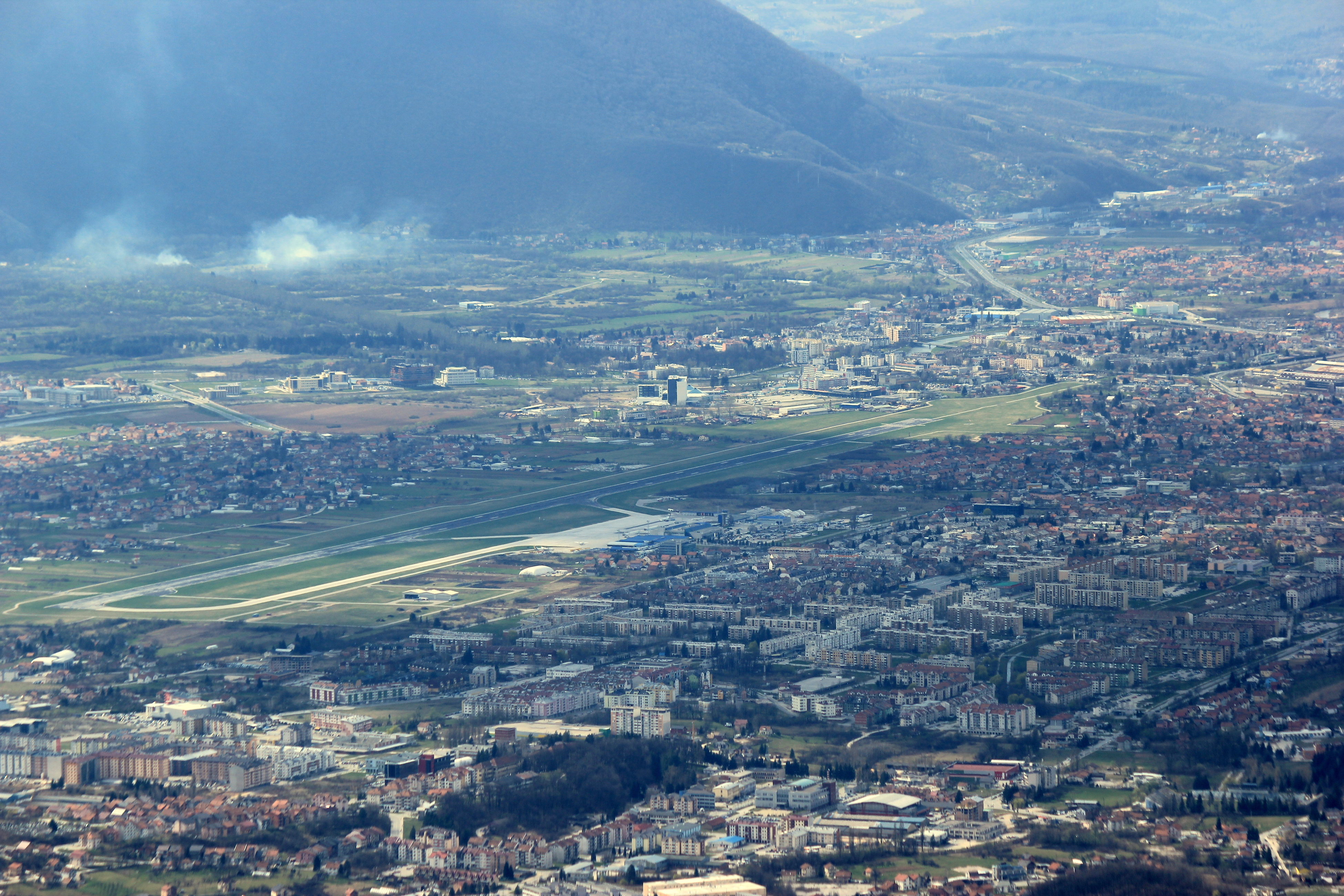 Blick auf den Sarajevoer Stadtteil Dobrinja vom Trebević aus.